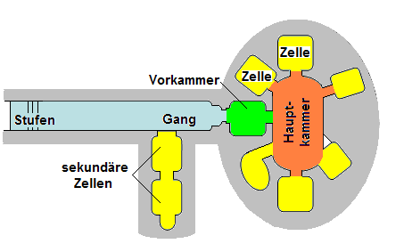 Anghelu Ruju